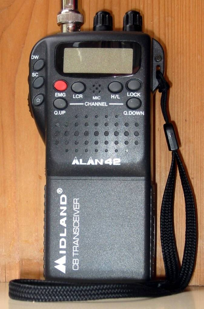 Ein CB-Handfunkgeraet